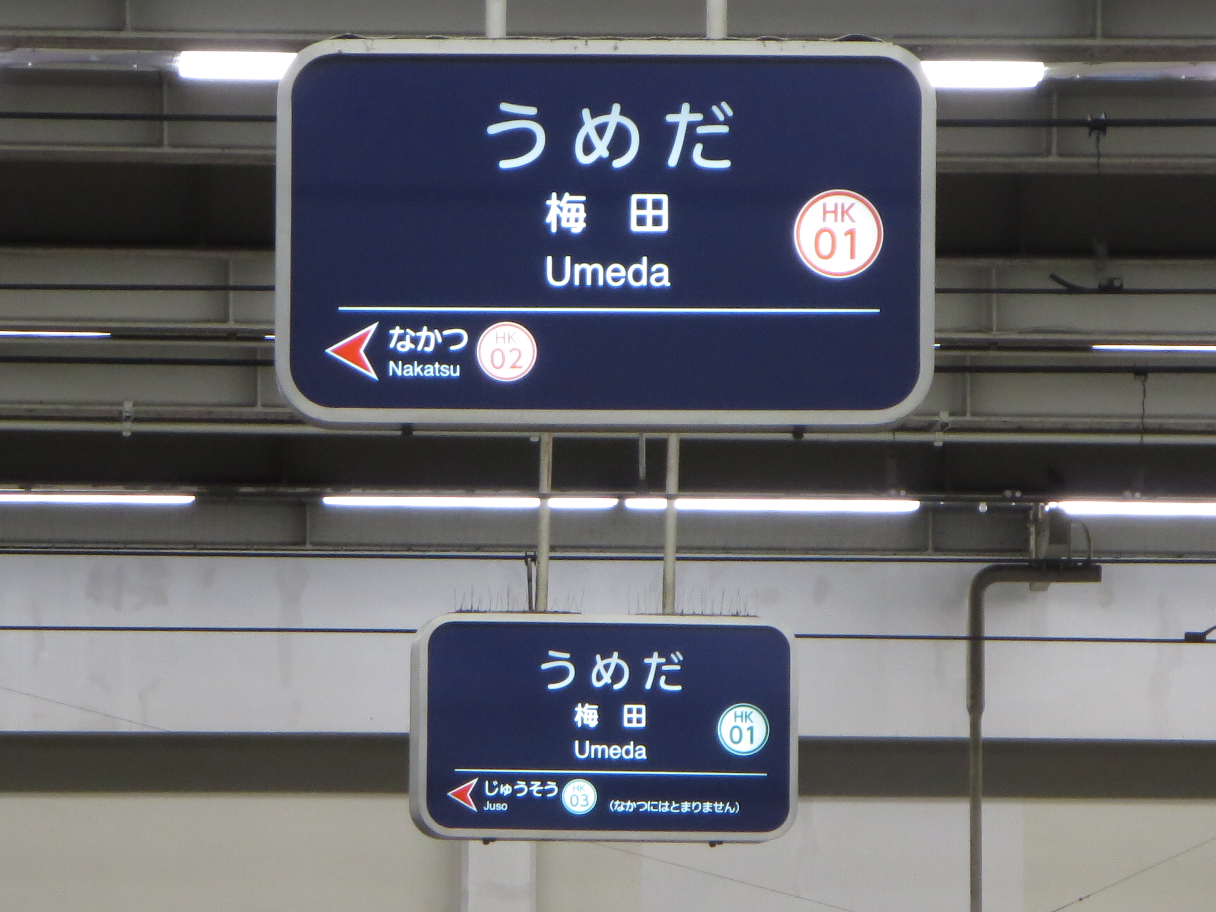 阪急梅田駅構内にて撮影。 画面奥京都線側は十三、画面手前宝塚線側は中津を隣駅と表示している。